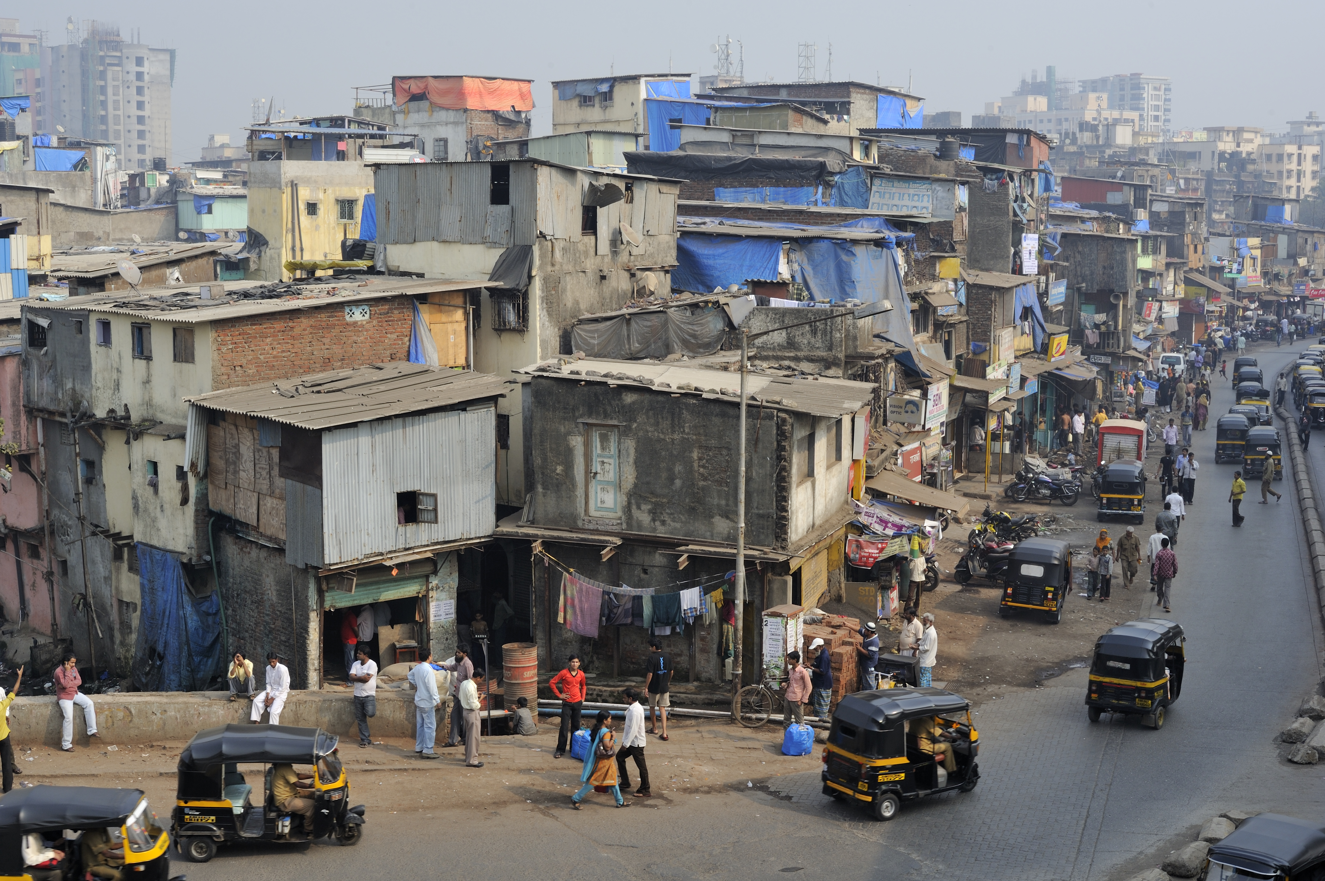 Dharavi_DSC3254